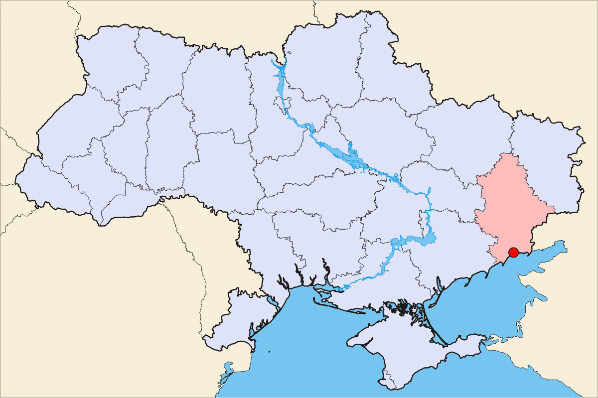 map